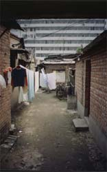 北京西城李大钊故居